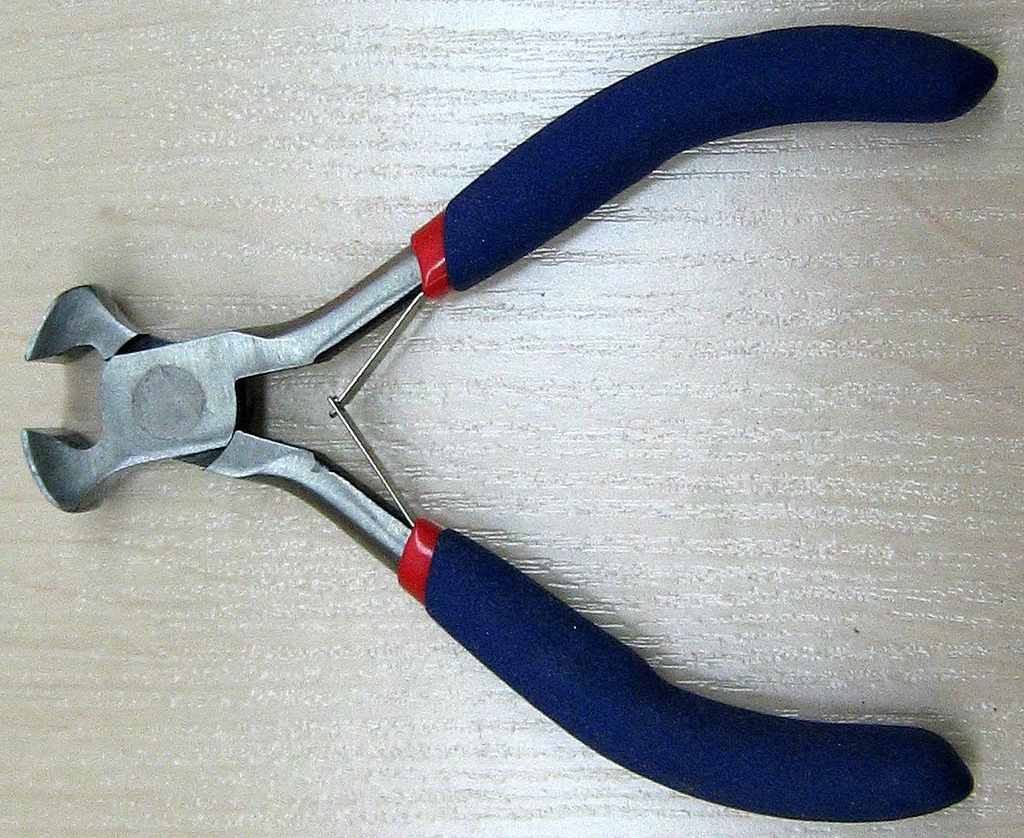 Otsalõikur